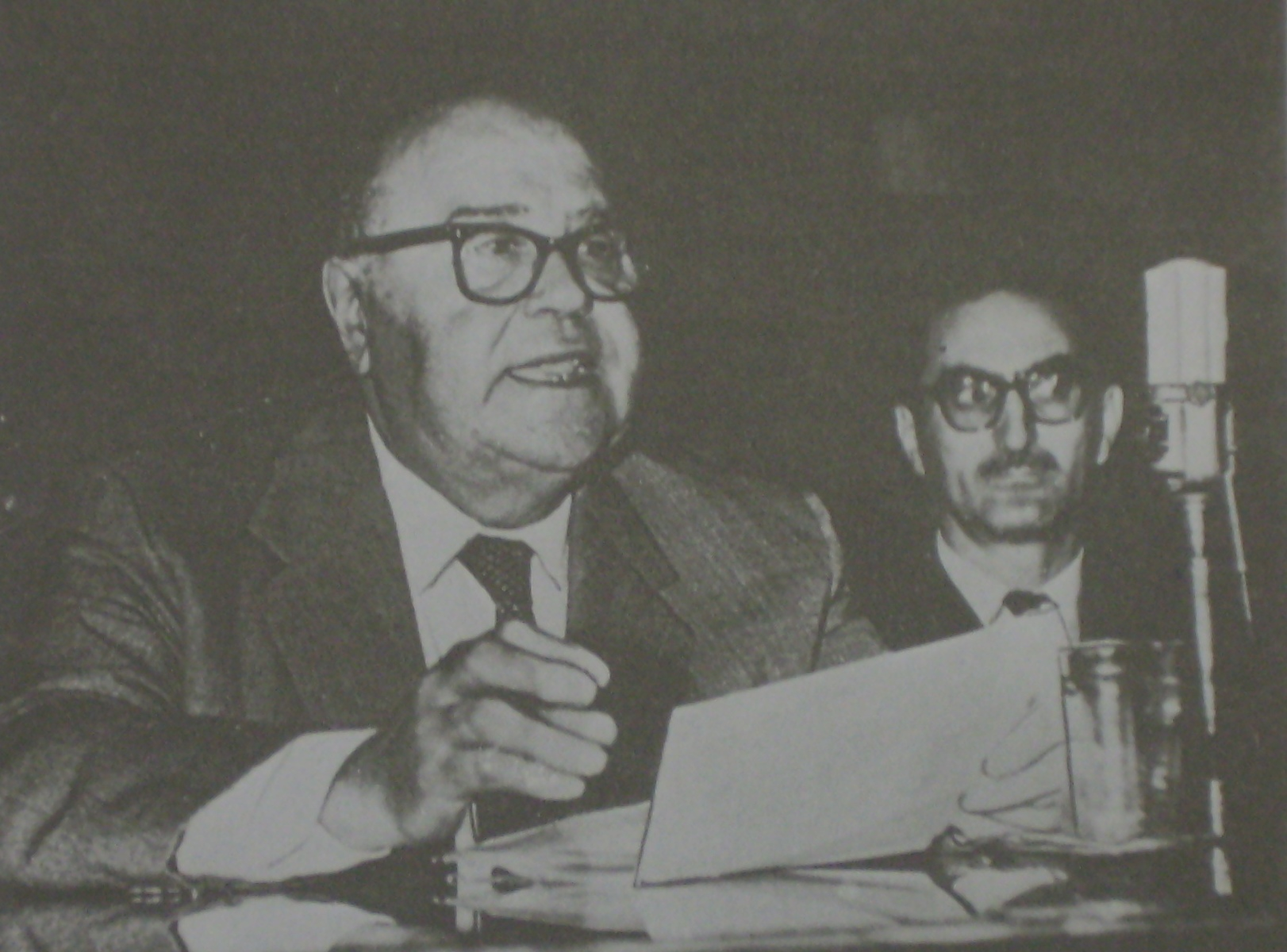 Francisco Romero (1891—1962) disertando, detrás Risieri Frondizi